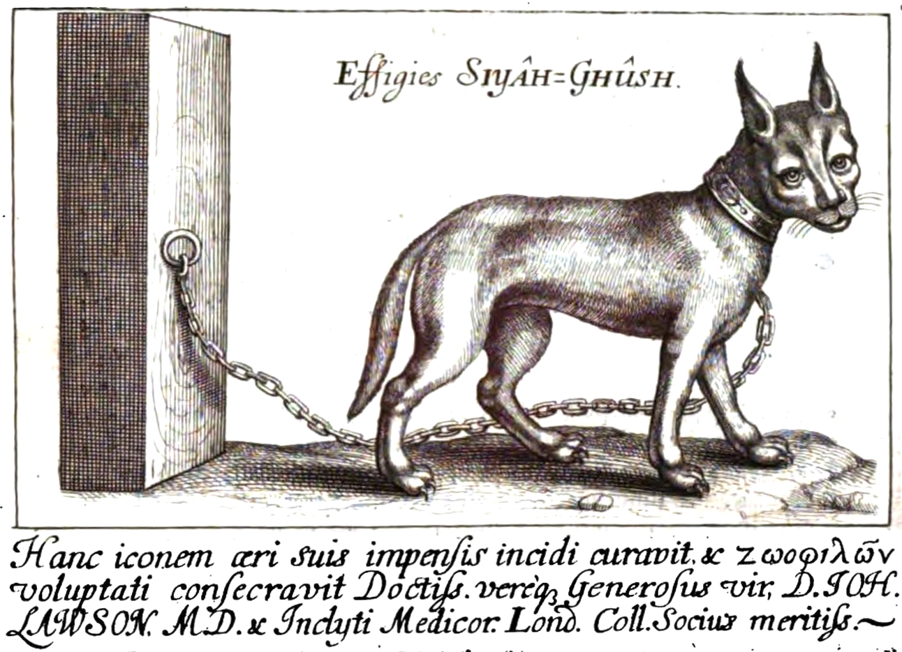 Planche de Walter Charleton (1677) décrivant le Siyah Gush (Caracal caracal) dans : Charleton, W. 1677. (Gualteri Charletoni) Exercitationes de differentiis & nominibus animalium. Quibus accedunt mantissa anatomica, et quaedam de variis fossilium generibus, deque differentiis & nominibus colorum. Oxoniae, e theatro Sheldoniano (Oxford, Sheldonian Theatre, London). 119 pp.